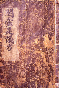 Eumsik dimibang (음식디미방), a cookbook made in 1670 by Jang Gyehyang(장계향), or Lady Jeong of Andong, Gyeongsangbuk-do located in Korea.